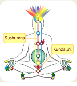 Diagramma dei chakra e Kundalini